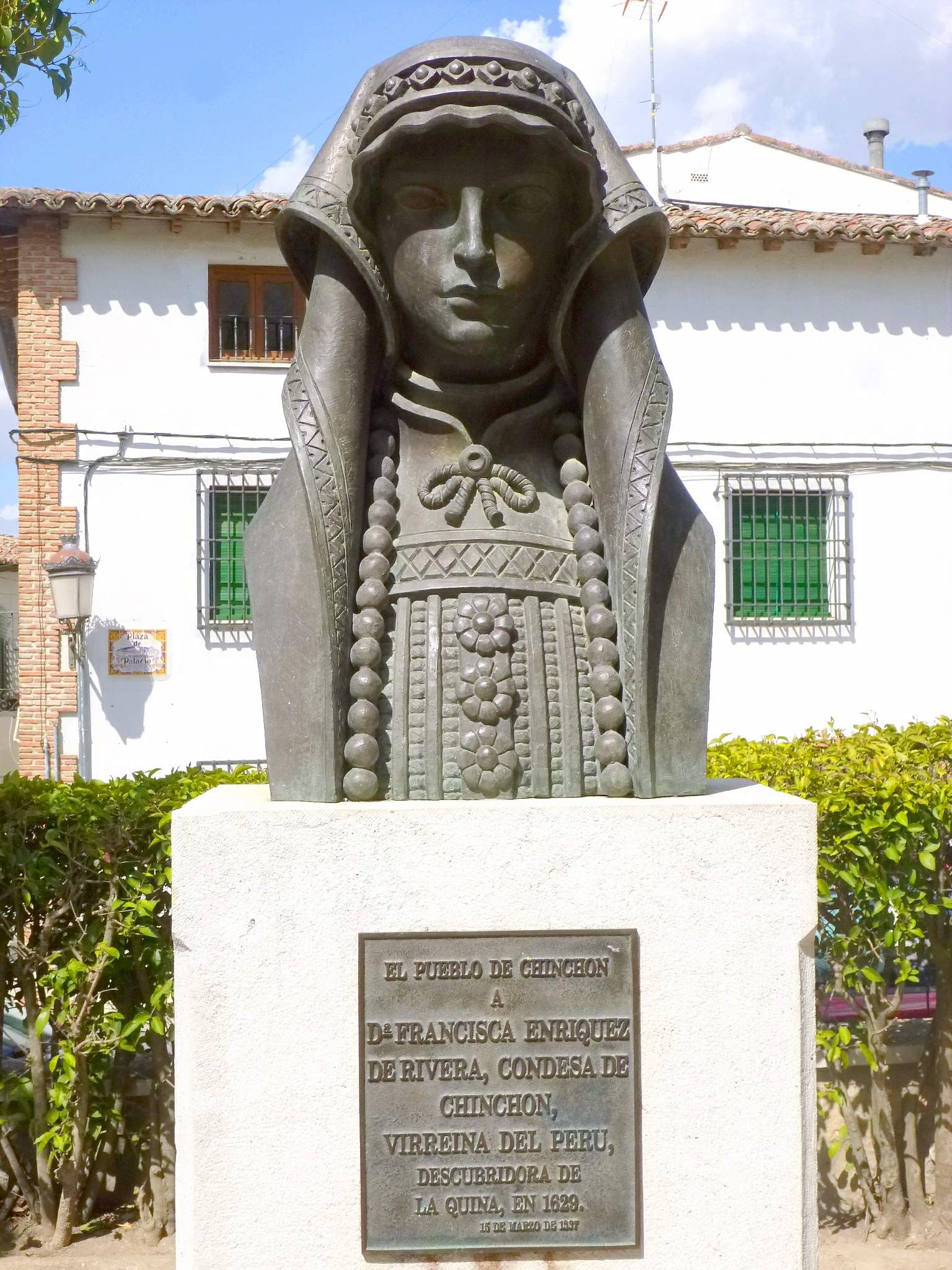 Monumento a Francisca Enríquez de Rivera, Condesa de Chinchón y Virreina del Perú (Chinchón, Madrid)